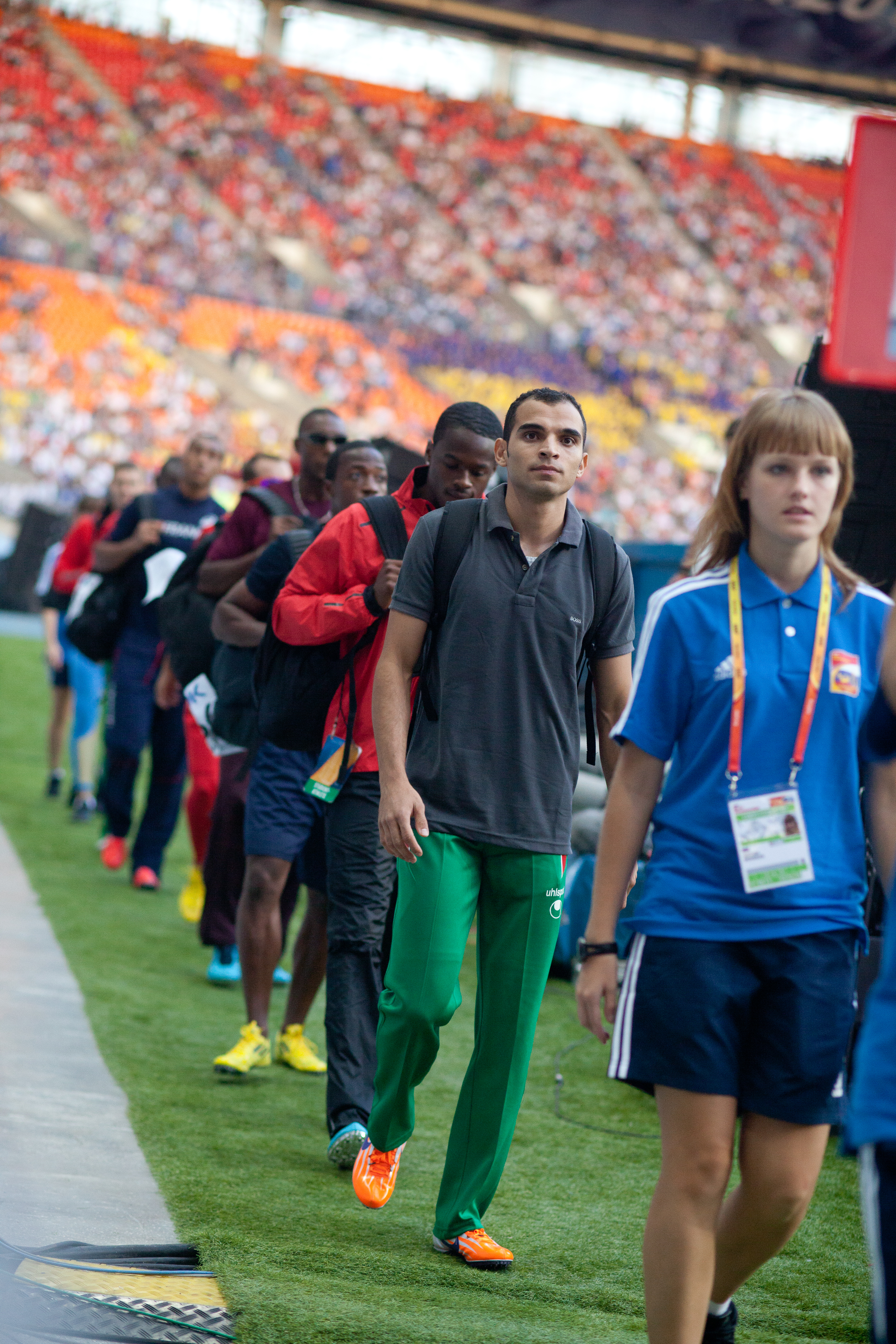 Первый день Чемпионата мира по легкой атлетике в Москве